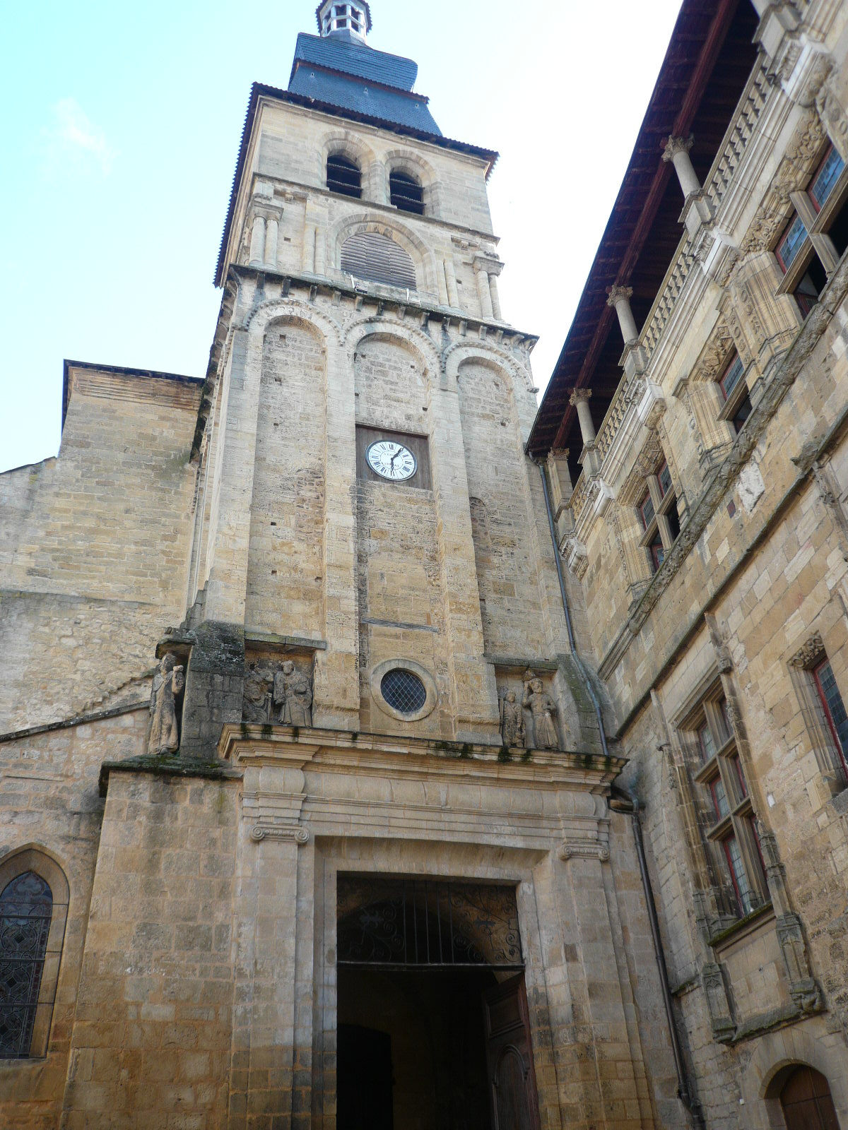 Cathédrale Saint-Sardos de Sarlat